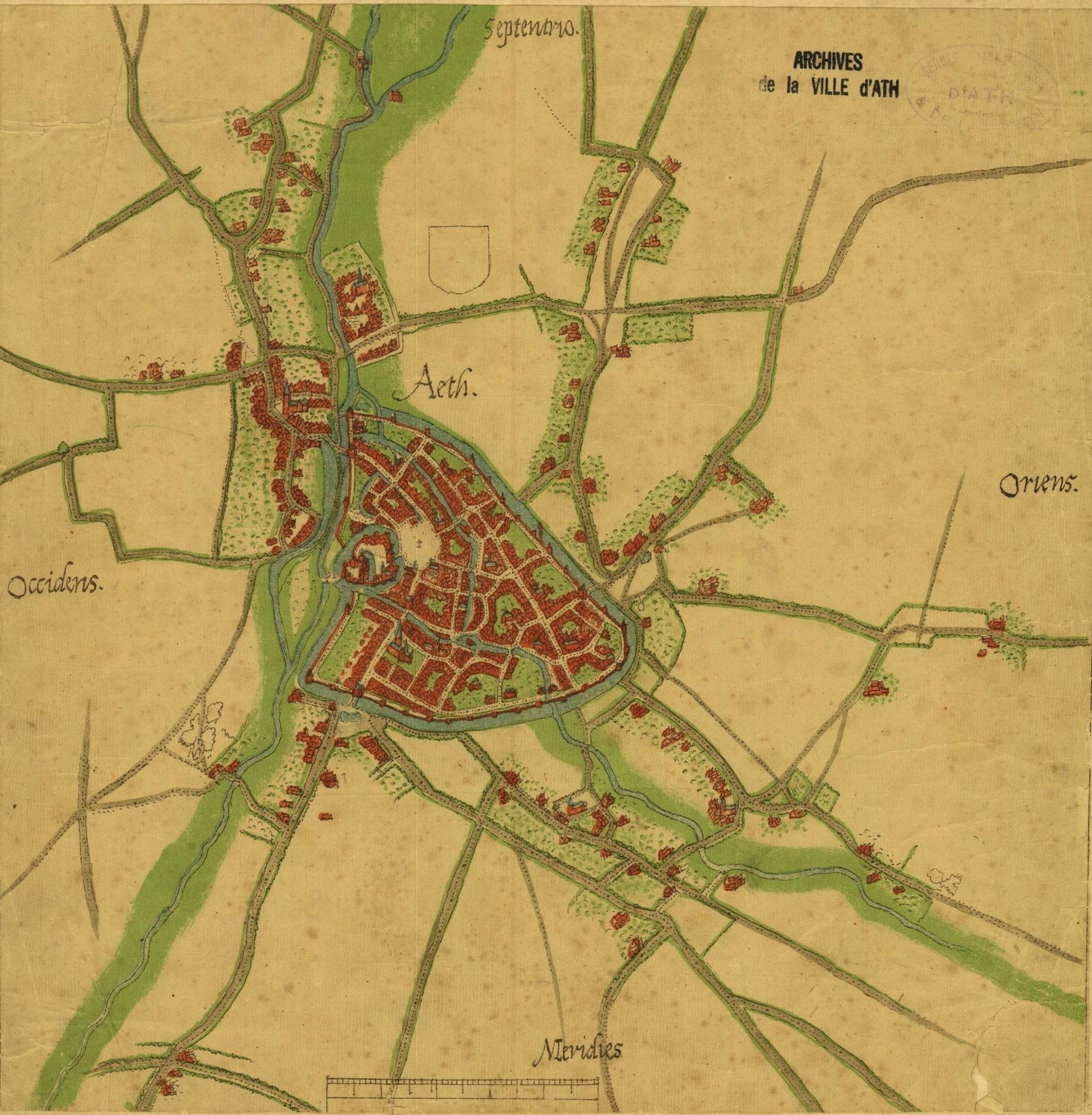 Le plan de la ville d'Ath XVIe siècle